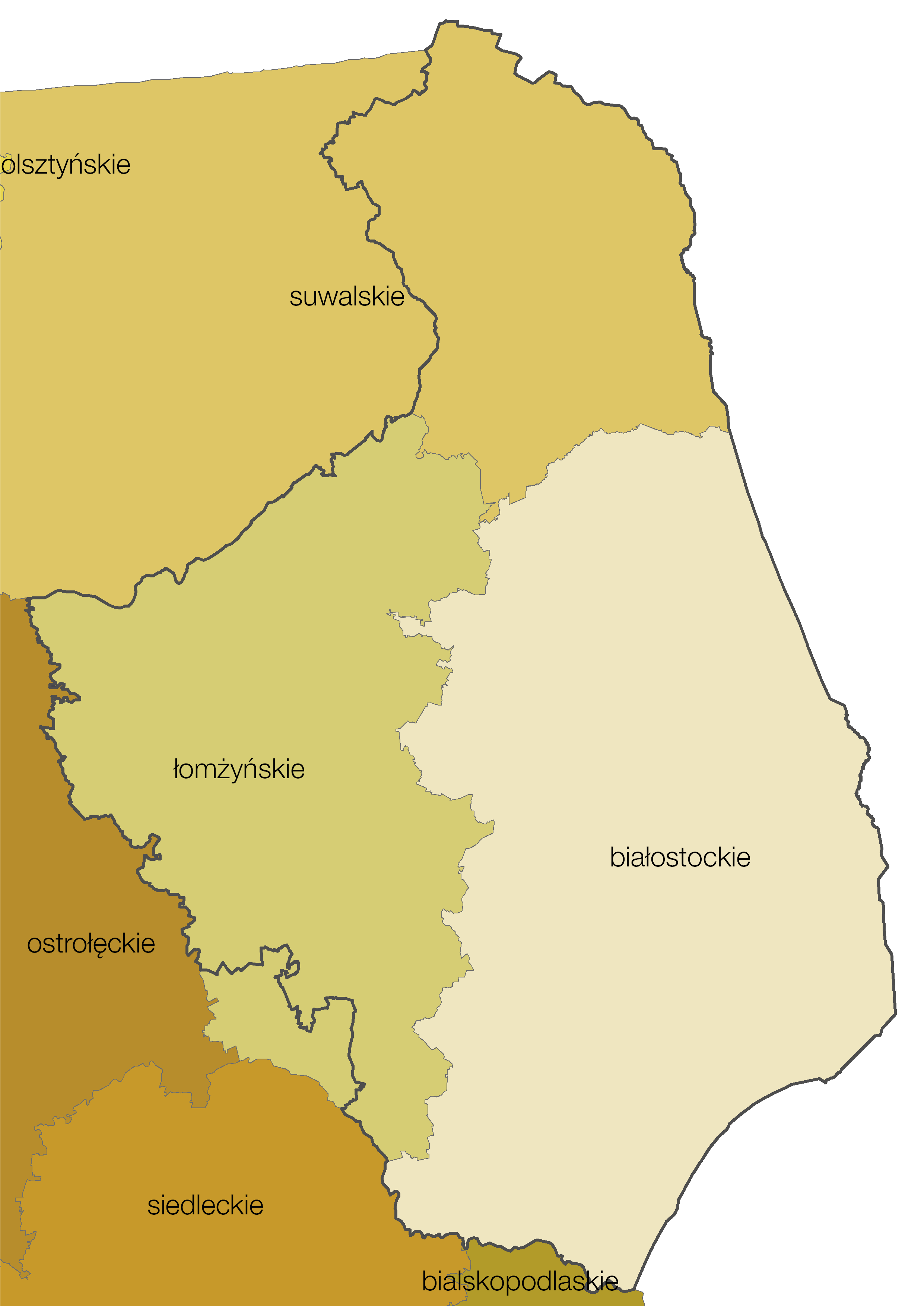 Województwo podlaskie (od 1999) jako powstałe z województw podziału administracyjnego Polski z lat 1975-1998